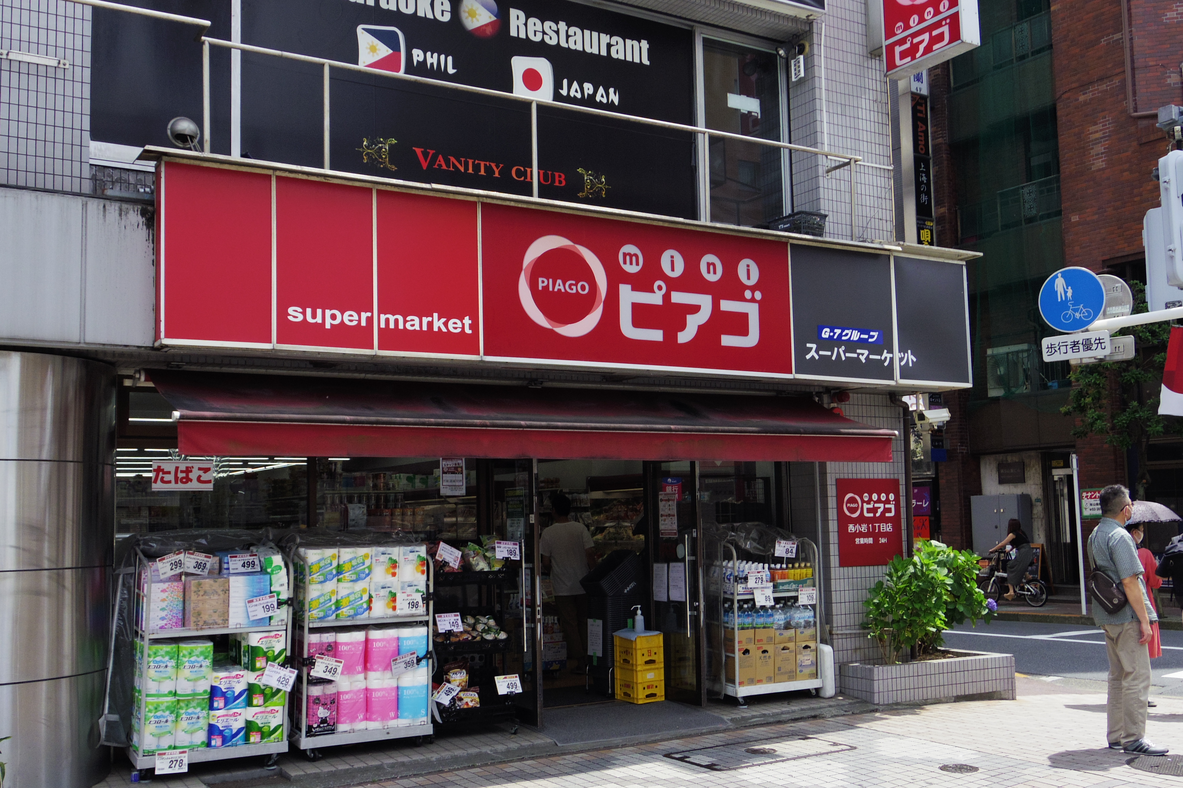 miniピアゴの運営会社株式会社99イチバがG-7ホールディングス傘下に入ったあとのため、看板にG-7グループの記載が追加されている。